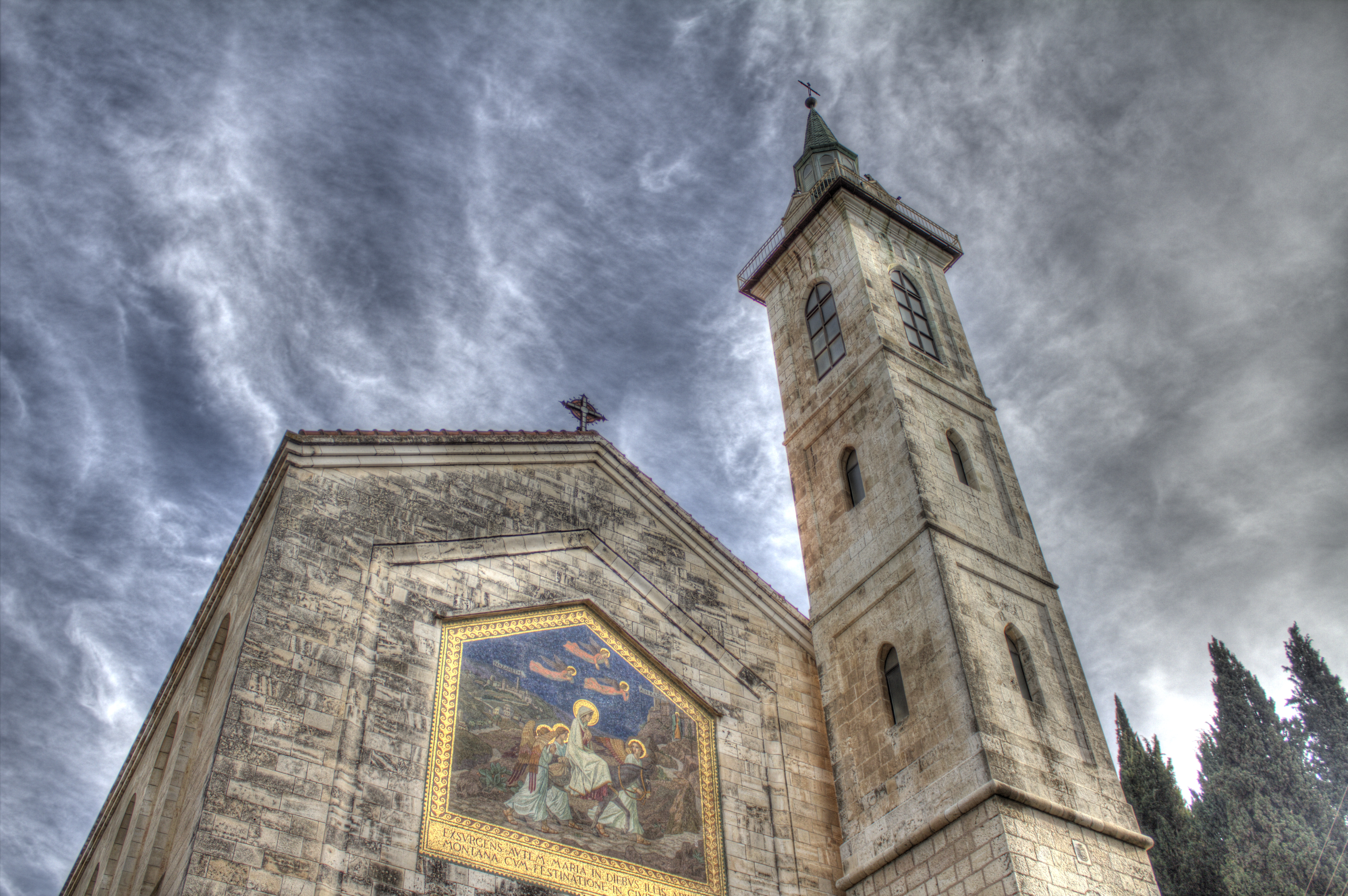 כנסיית הביקור היא כנסייה המוקדשת לביקור המתואר בבשורה על פי לוקאס – ביקורה של מרים, אם ישו אצל אלישבע, אם יוחנן המטביל, כששתיהן היו הרות. הכנסייה ניצבת במקום בו עמד בית הקיץ של זכריה ואלישבע, הוריו של יוחנן.